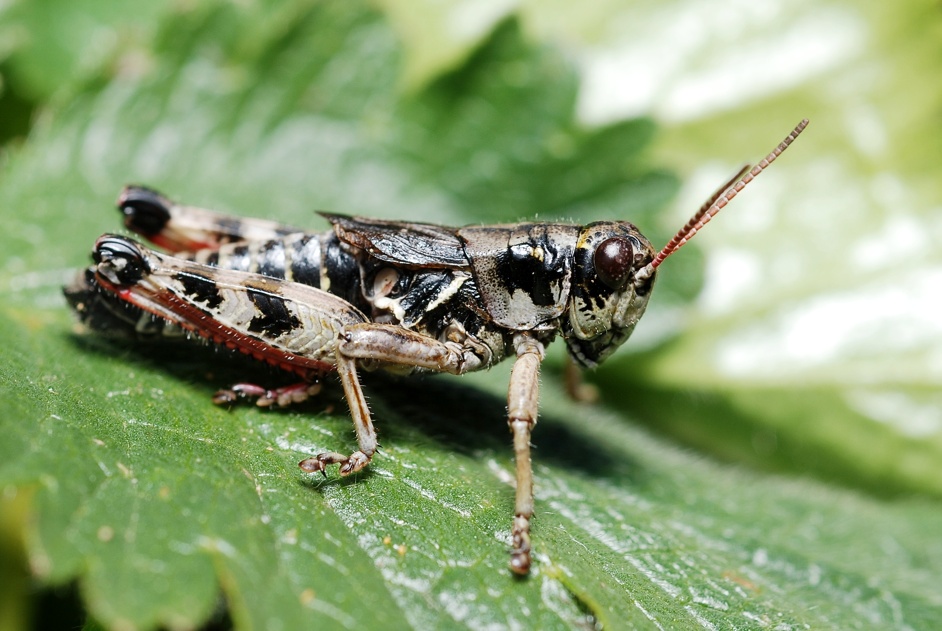 Melanopus frigidus male